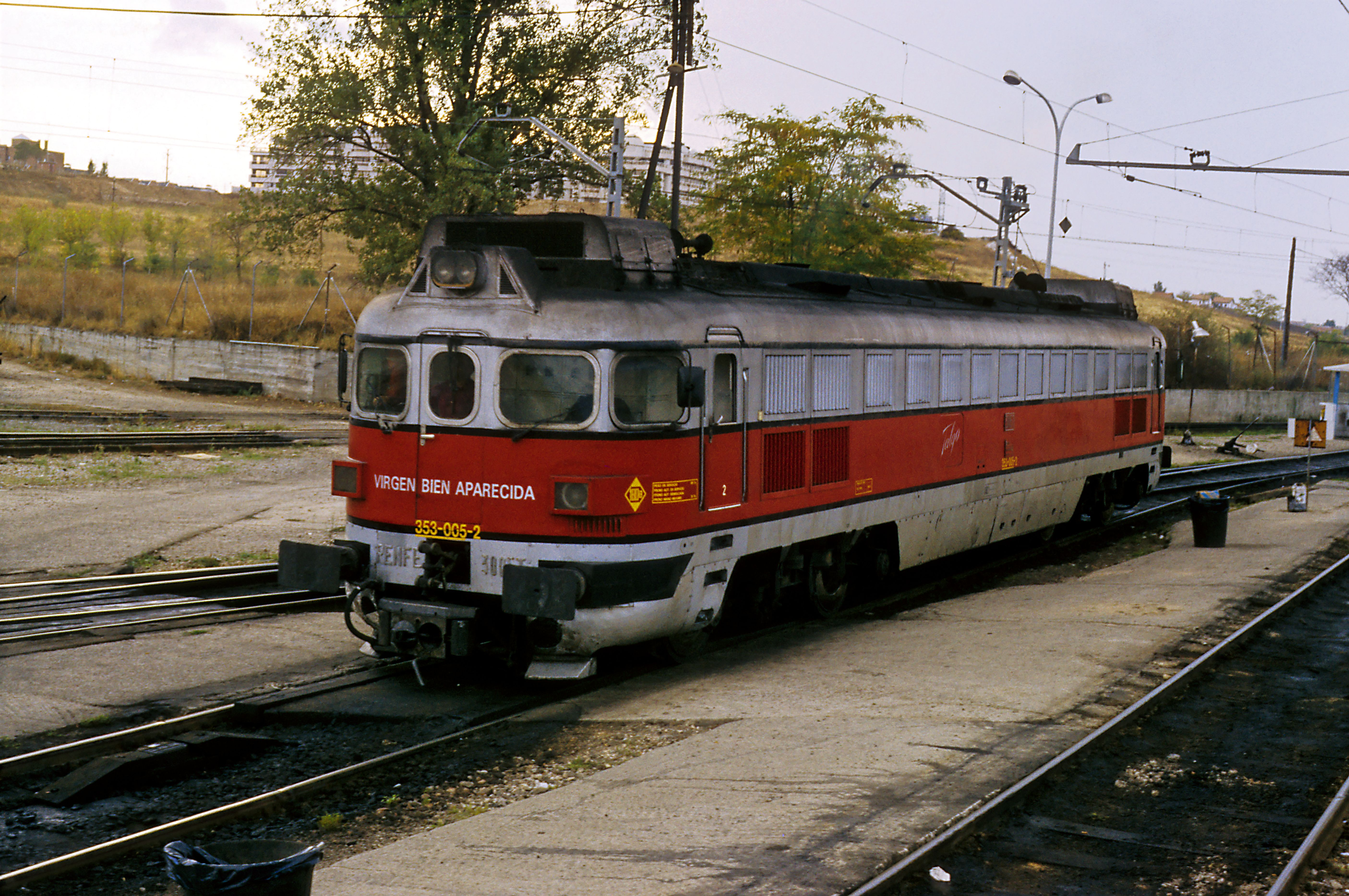 Im Talgo-Werk Las Rosas. Tfz für Talgo III, deshalb mit tiefliegenden Talgo-Scharfenbergkupplungen und hydraulisch vorgespannten Puffern ausgerüstet See also: Talgo.